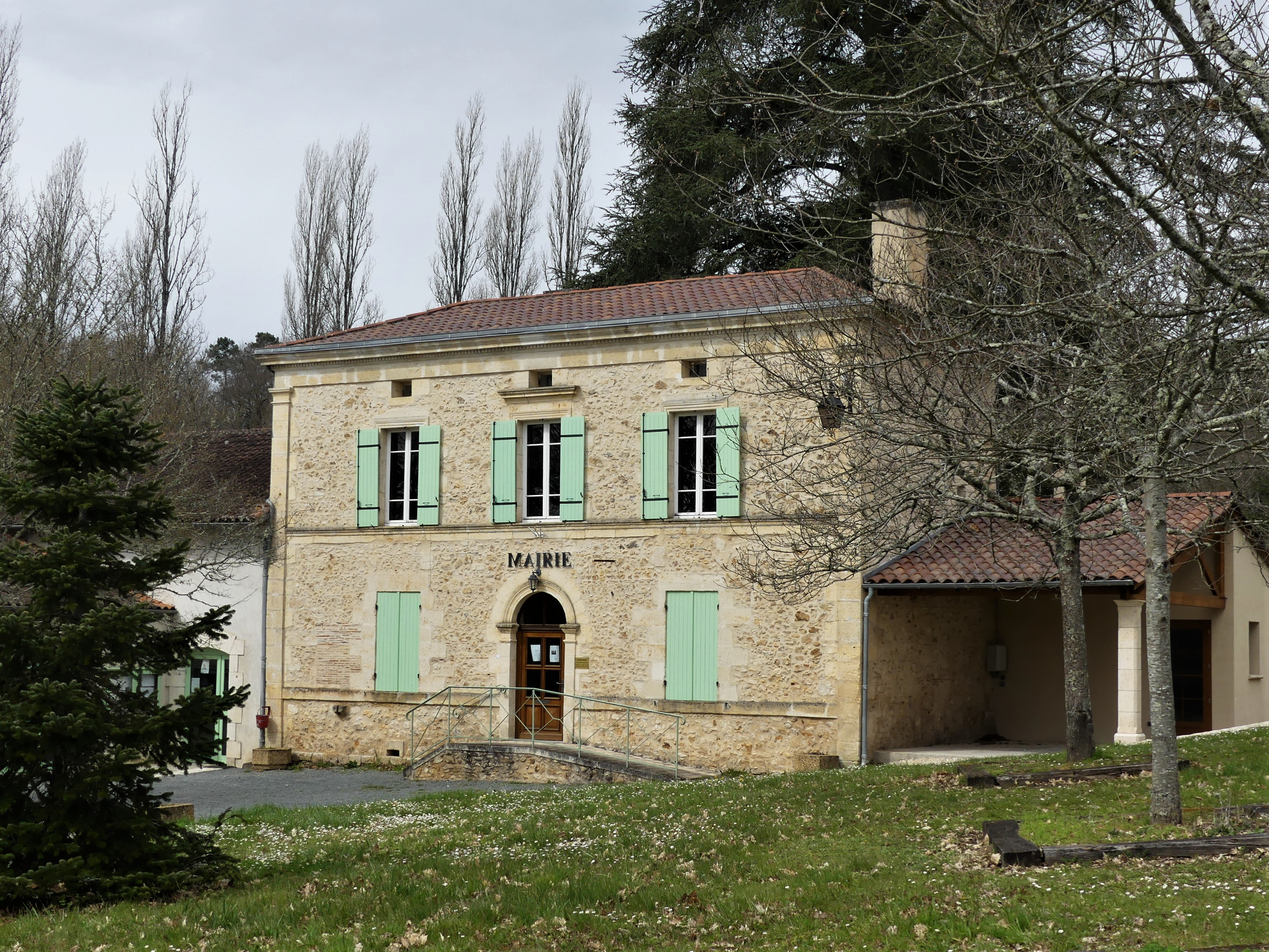 La mairie d'Église-Neuve-d'Issac, Dordogne, France.